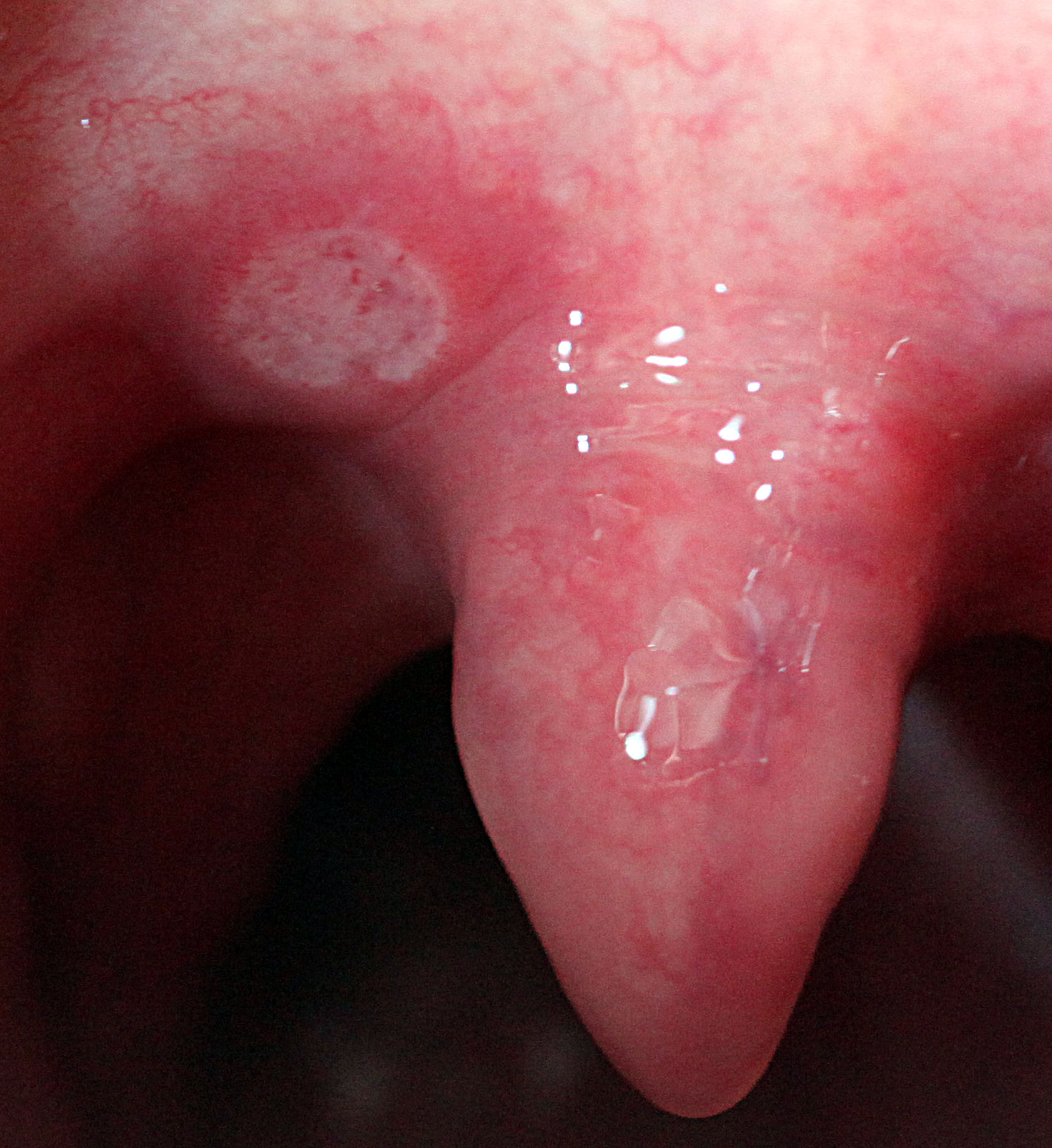 Aphte in unmittelbarer Nähe des Gaumens